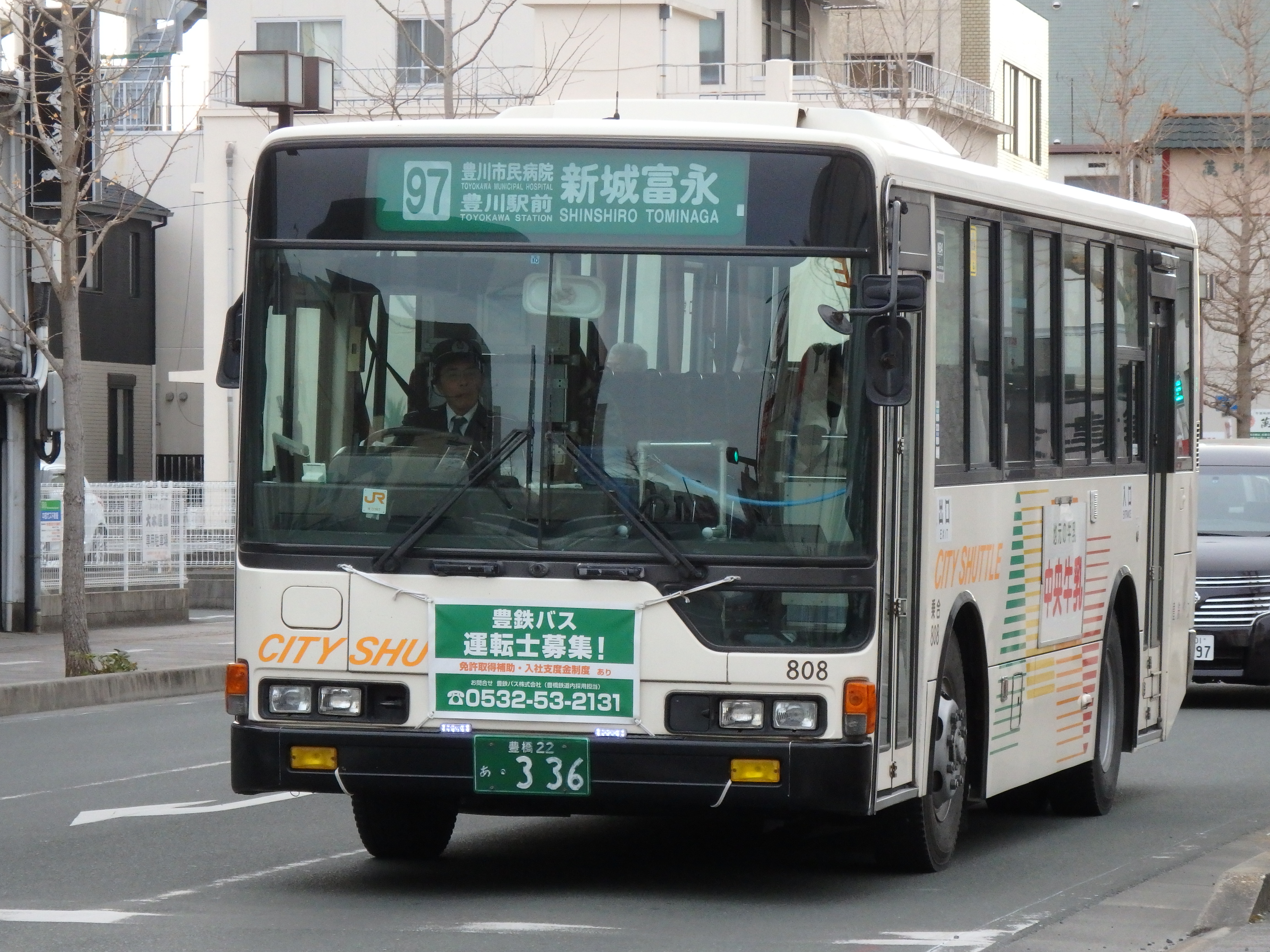 豊川線の運用に入るエアロスターMM